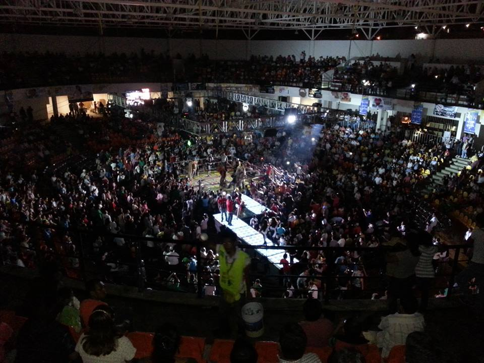 Arena llena durante un evento de Lucha Libre